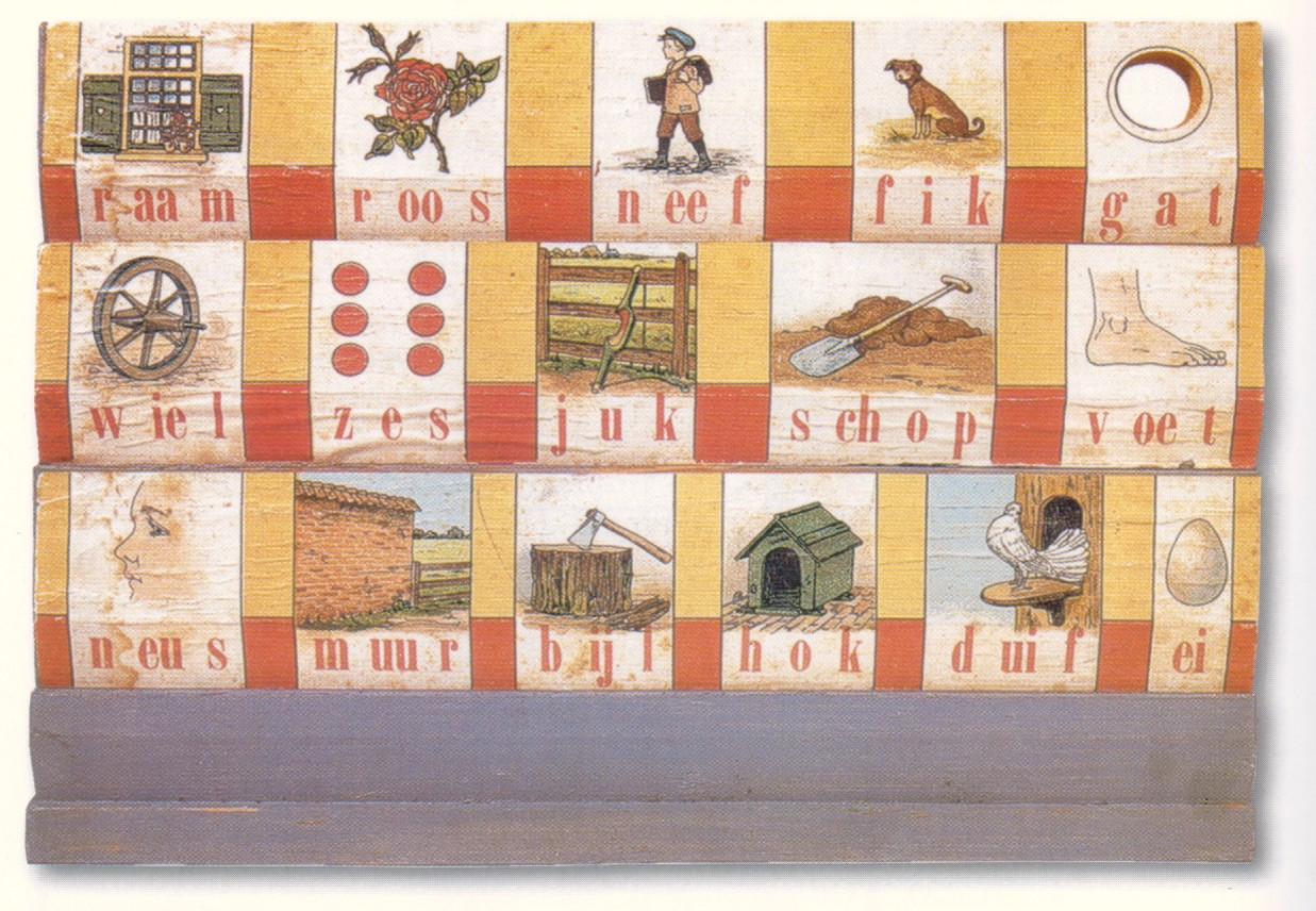 Foto van de 2e versie van Hoogeveens eigen leesplankje